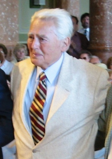 Az 1956-os melbourne-i olimpia aranyérmes vízilabdacsapatának 2004-ben még élő tagjai a Magyar Örökség díj átvételekor (balról jobbra): Jeney László, Markovits Kálmán, Kárpáti György, Bolvári Antal, Gyarmati Dezső